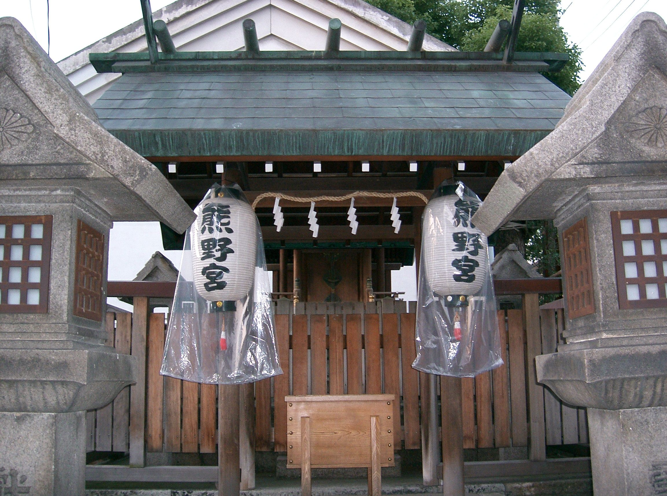 野田恵美須神社 熊野宮